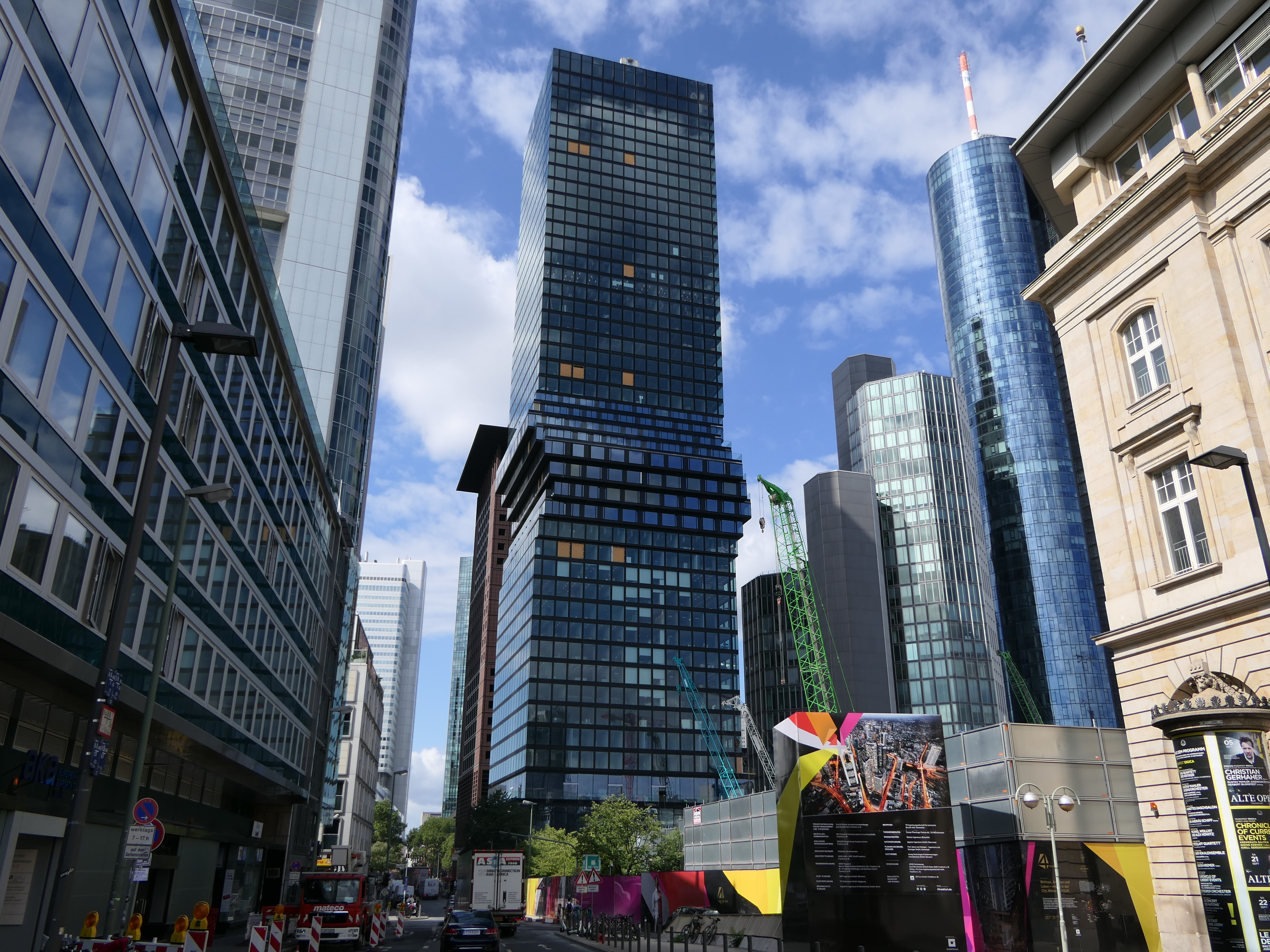 Baufortschritt am Omniturm in Frankfurt im August 2019.